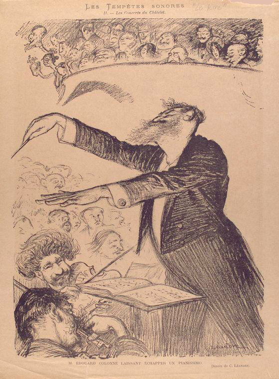 Les Tempetes Sonores M. Edouard Colonne laissant échapper un pianissimo (Gravure)